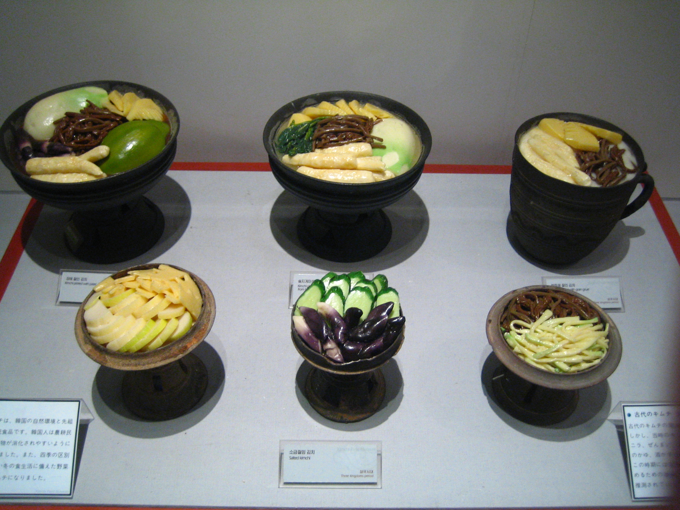 Ancient Kimchi at Kimchi Museum in Seoul, Korea